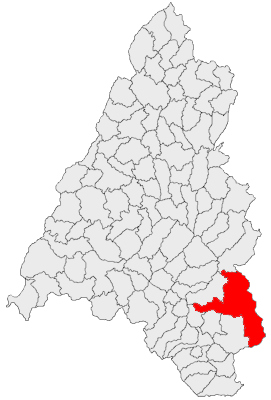 Categorie:Hărţi ale judeţului Bihor